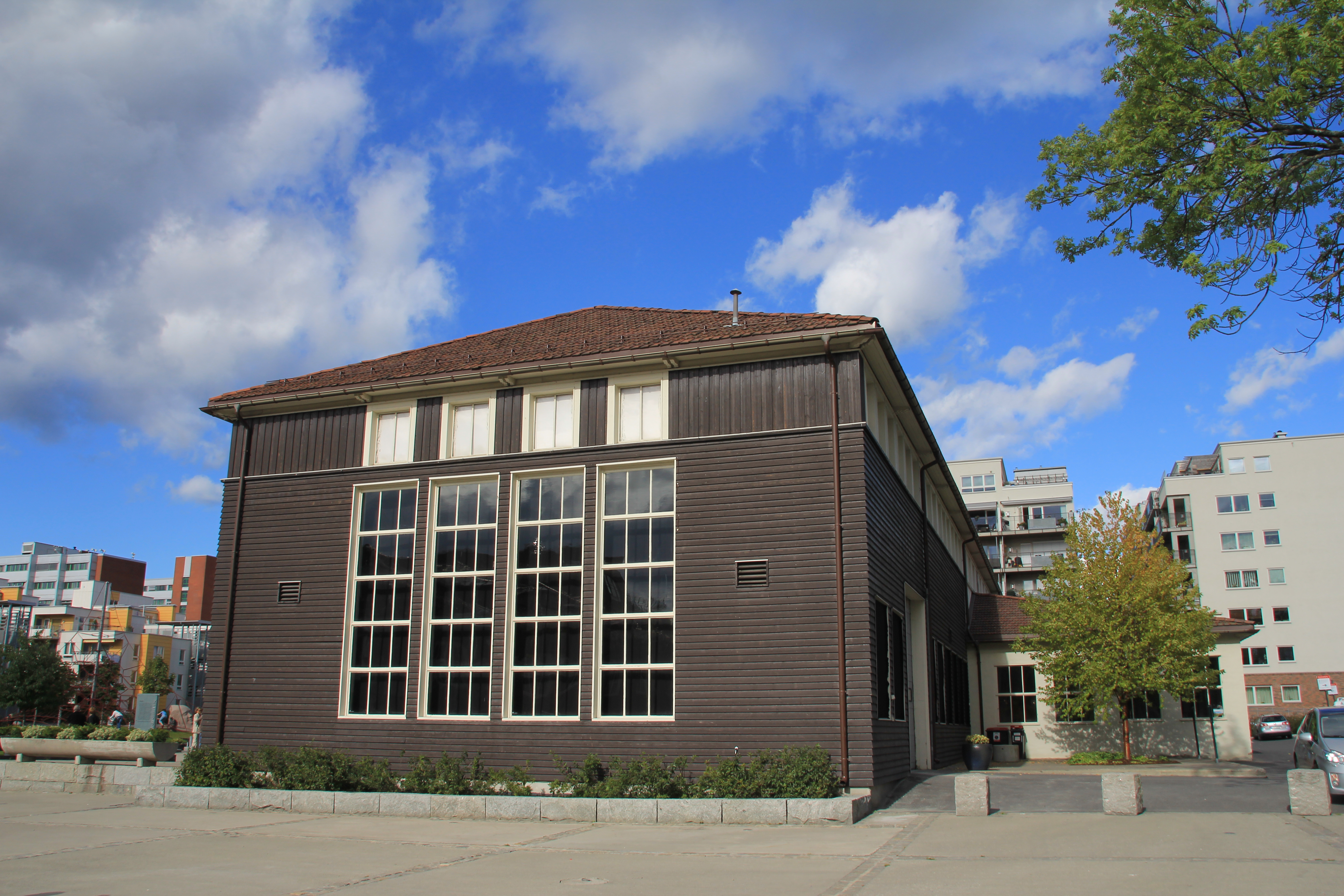 Kanonhallen på Løren i Oslo. Den ble anlagt av tyskerne under 2. verdenskrig. Fredet.